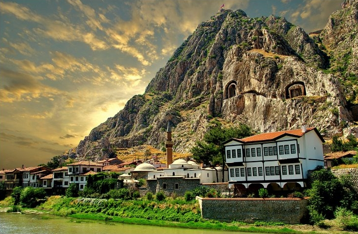 Bu manzada ön planda yeşilırmak boyunca uzanan tarihi evlerden sadece birisi olan ve 1865 yılında inşaa edilen tarihi "HAZERANLAR" konağı görülmektedir.Günümüzde Müze Ev olarak hala dimdik ayaktadır yanı başında ise Hatuniye Camii bu güzel manzaraya ayrı bir ruh hali katarak yıllara meydan okurcasına minarelerinden yankılanan ilahi nağmeleri ile ibadete davet etmeyi aralıksız sürdürmektedir.